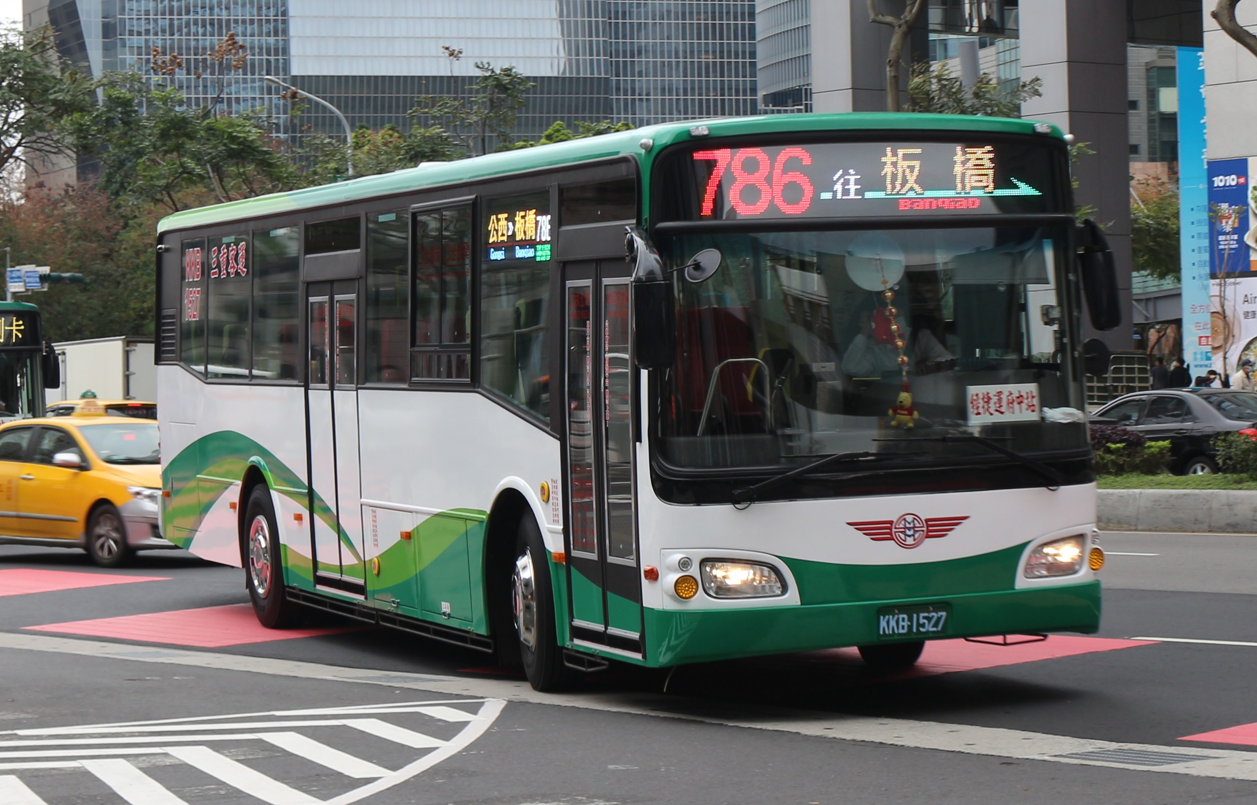 三重客運2020 HINO RK8JRVA-KJF KKB-1527 786